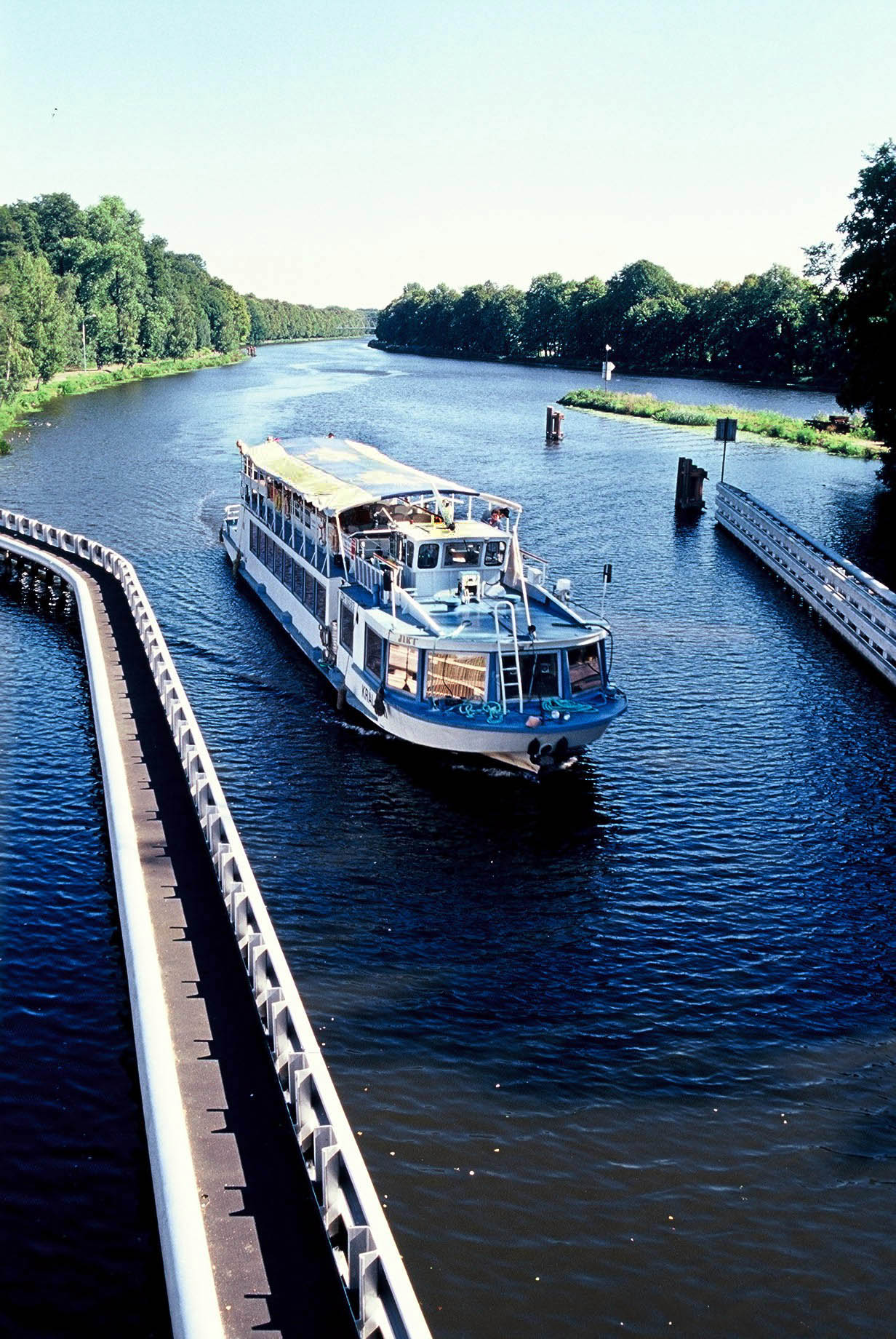 Parník Král Jiří připlouvá ze soutoku Labe s Cidlinou do zdymadla v Poděbradech.